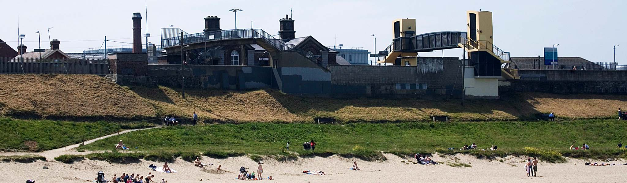 Вид на станцию Балбригган с пляжа. Производная работа от Photographed In Balbriggan - County Dublin, Ireland автора William Murphy размещённой на Flickr под Creative Commons Attribution Share-alike license 2.0